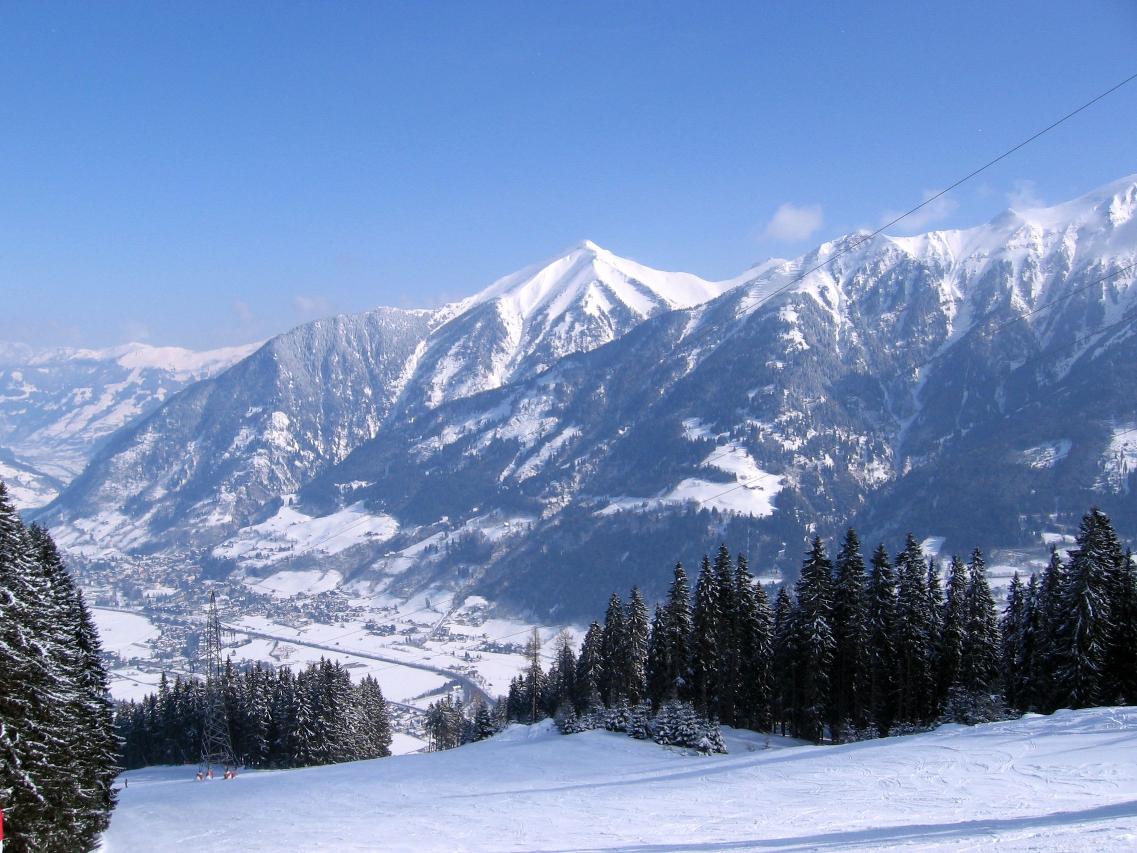 Zusehen ist der Ort Bad Hofgastein von der Angertalabfahrt am Stubnerkogel aus aufgenommen, im Hintergrund die Laderdinger Gamskarspitze (2413m)